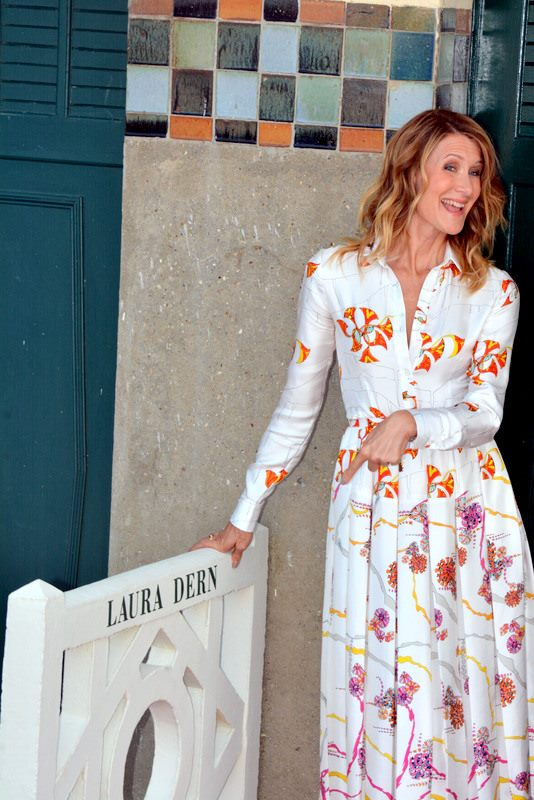 Laura Dern au festival du cinéma américain de Deauville